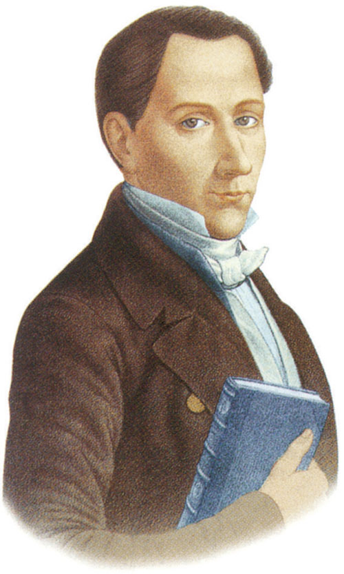 Diego José Victor Portales Palazuelos Grabado que se encuentra en el Museo Histórico Nacional de Chile, copia del autor sacada del museo, licenciada para su uso en Wikipedia bajo los términos de